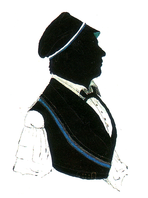 Thomas Mayer (1815-1870) als Student des Corps Suevia München, später Abgeordneter der Paulskirche